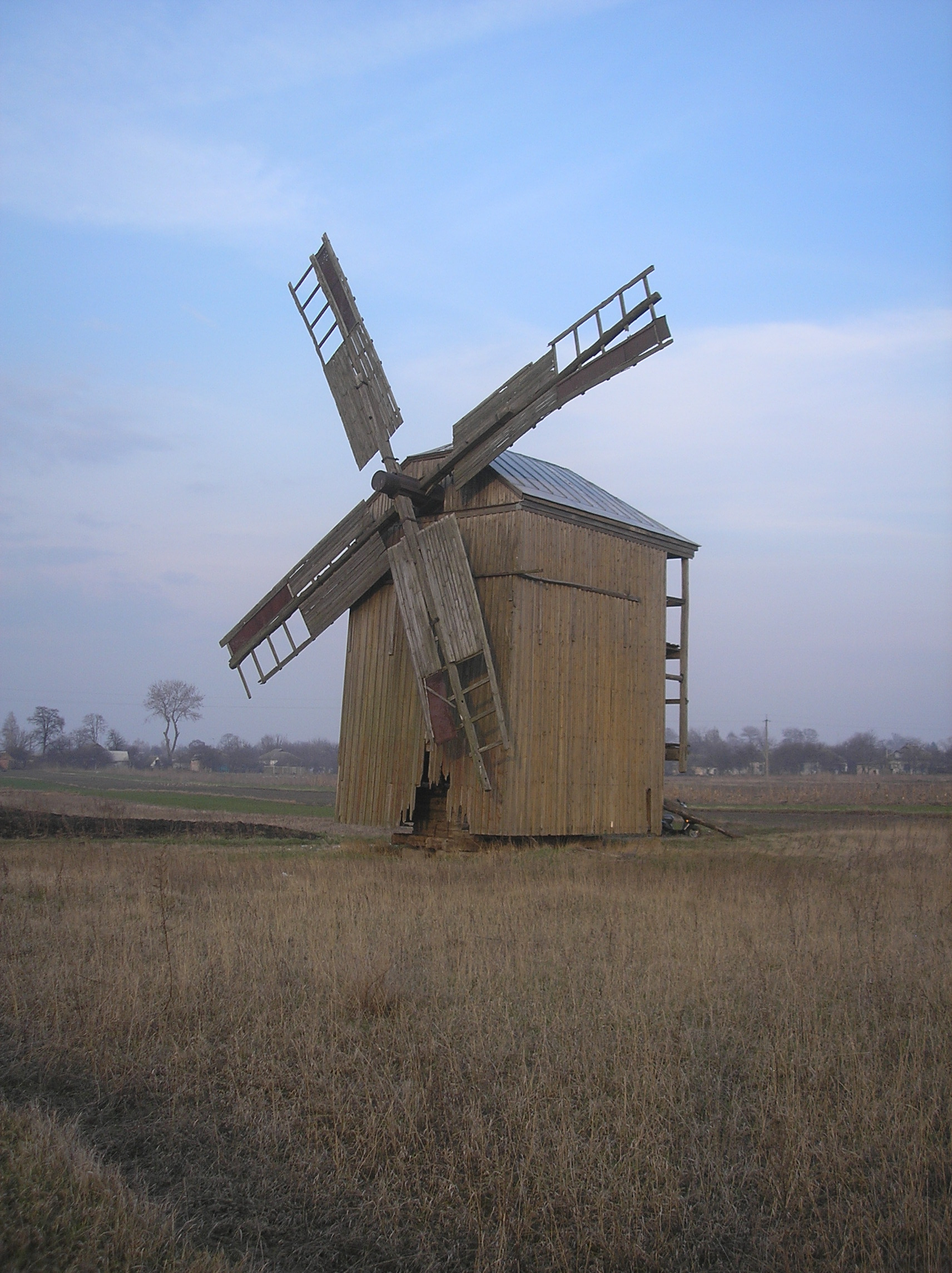 Село Пристроми Переяслав-Хмельницького району Київської області